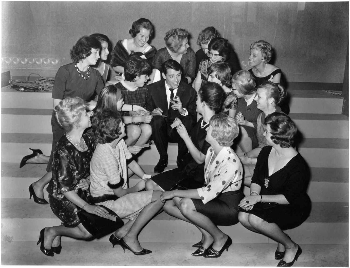 Jacques Brel met vrouwelijke fans na televisie-opnames van de Domino-show van Karel Prior en Thijs Chanowski in het Marcanti theater, Jan van Galenstraat, 22 maart 1962 Foto Ben van Meerendonk / AHF, collectie IISG, Amsterdam